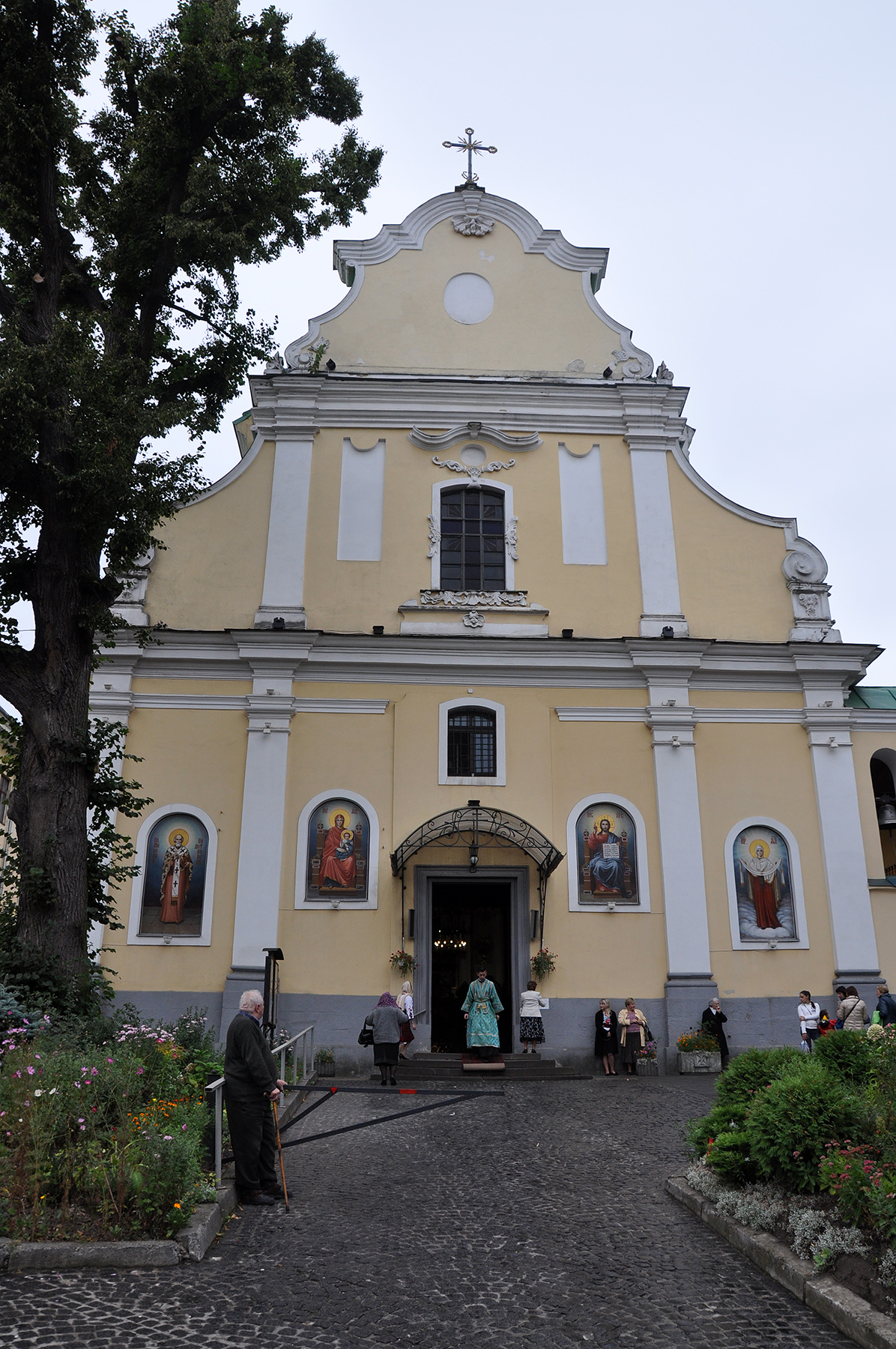 собор Святопокровський (Костел св. Миколи), Львів, Грушевського М., 2